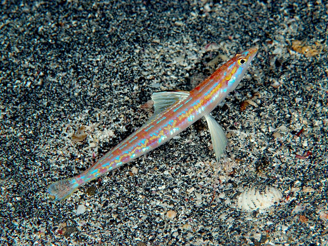 ホタテエソ Pseudotrichonotus altivelis